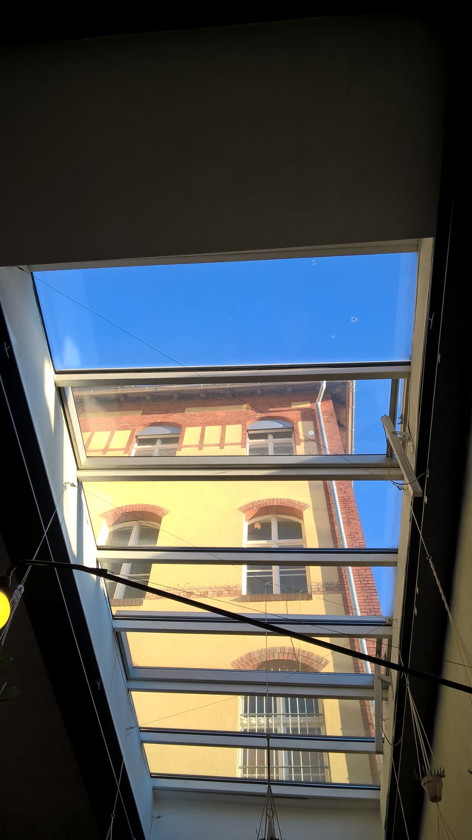 Oberlichter im Alten Postamt SW 61, EG, Hallesches Haus, nach der Renovierung 2010